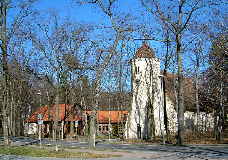 Evangelische Auferstehungskirche Spremberg/NL im Land Brandenburg, Deutschland